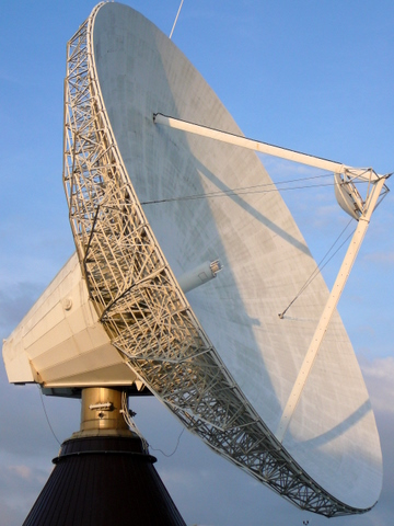 An antenna in Sweden. – JMT (T) 09:01, 11 March 2007 (UTC)